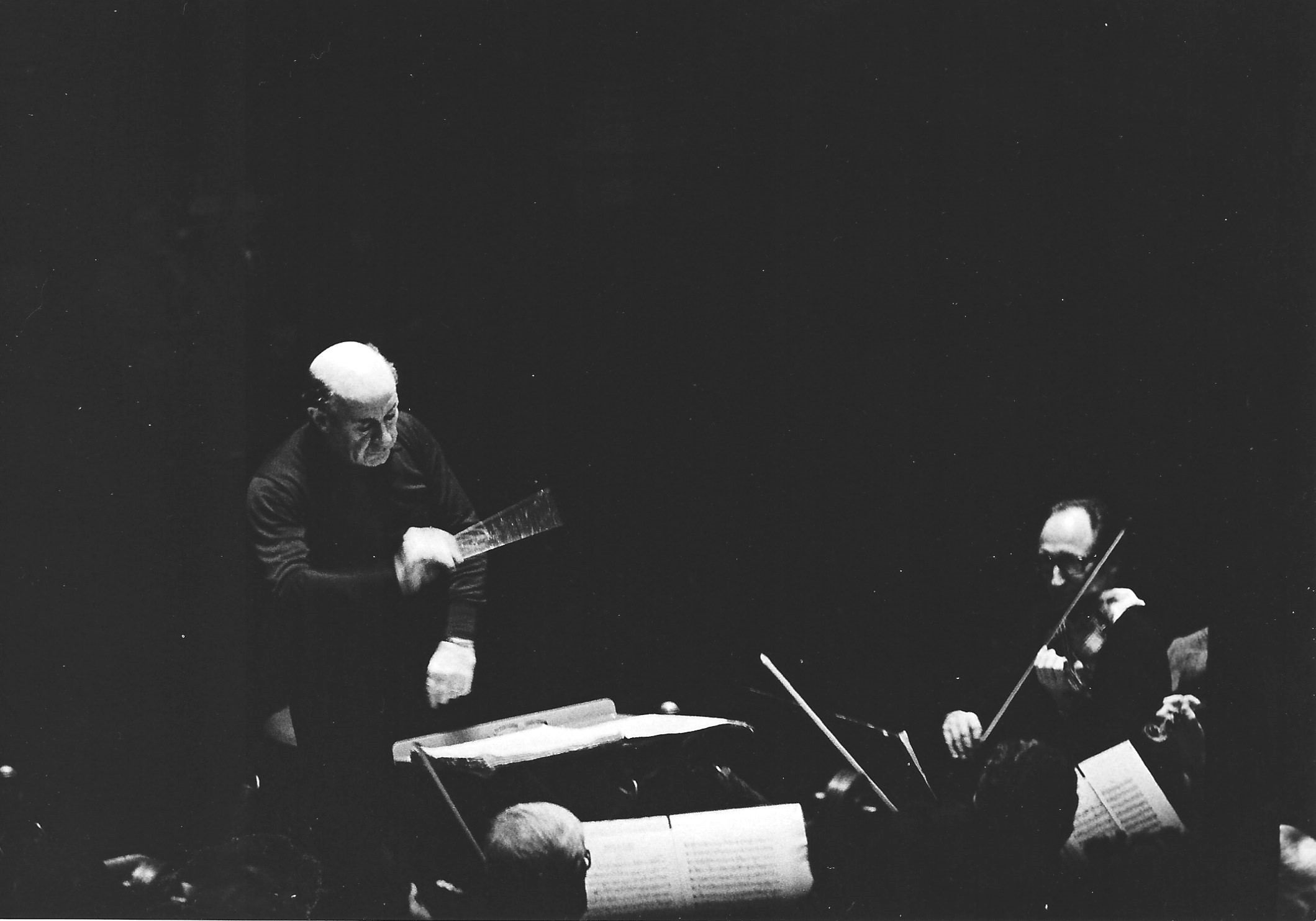 Prof. Leinsdorf; Probe mit dem Concertgebouw-Orchester Amsterdam; Winter 1973